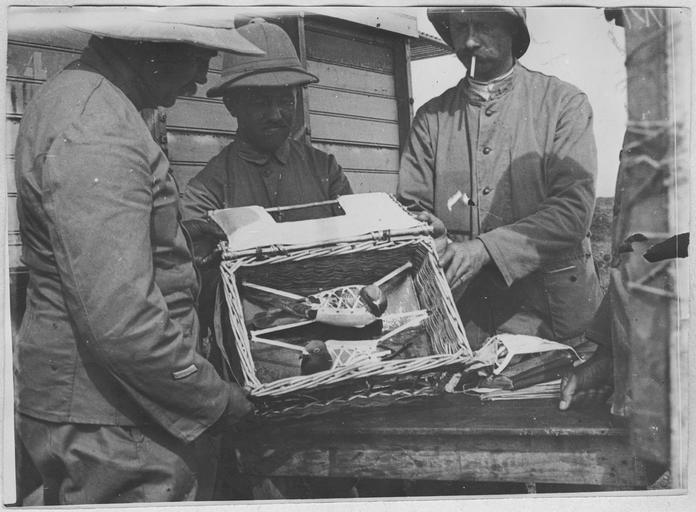 par le service photographique de l'armée d'orient, France.